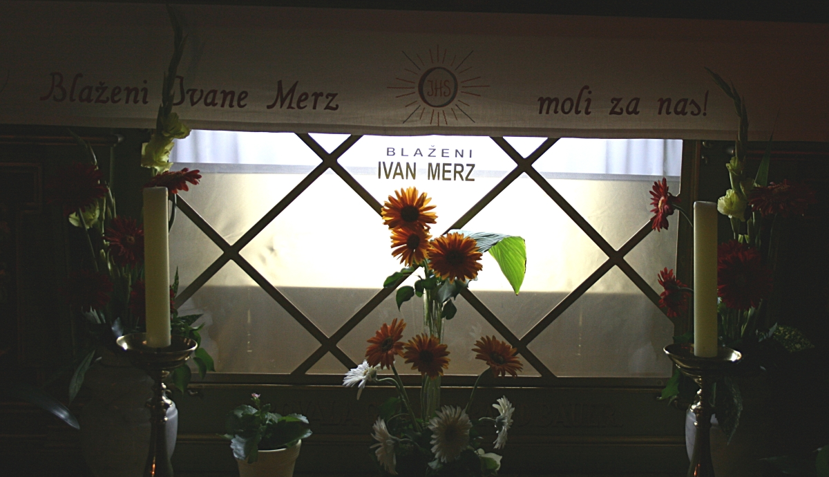 Grob Ivana Merza u Bazilici Srca Isusova u Zagrebu